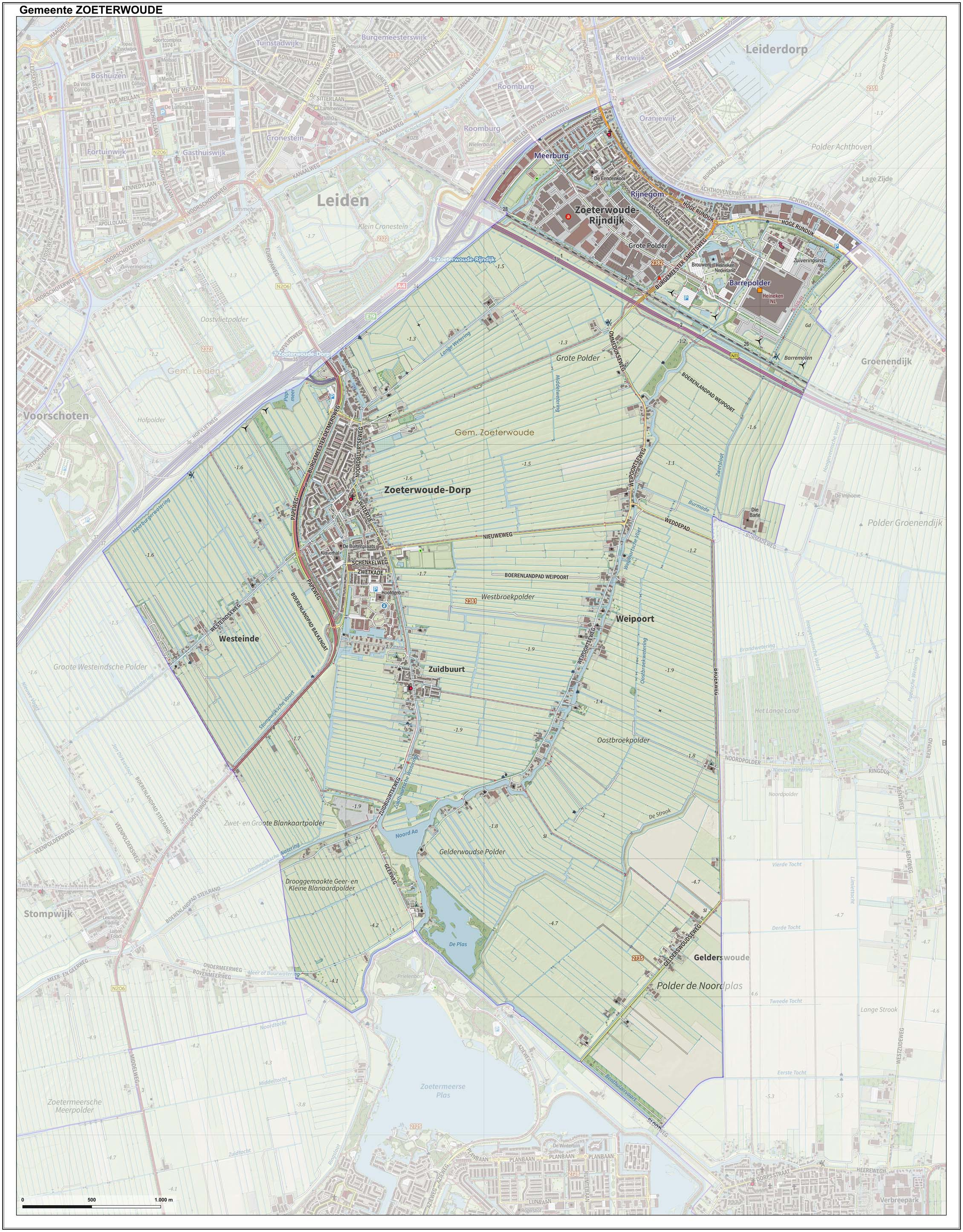 Topografische gemeentekaart. Resolutie: 400 pixels/km. Kaartbeeld samengesteld uit de open geodata van de Top10NL en Top25namen (Kadaster), Creative Commons-BY licentie. Gebouwvlakken uit open geodata BAG extract. Wegen uit de OpenStreetMap, OpenStreetMap community. Reliëfschaduw uit de Actuele Hoogtekaart AHN2. Samenstelling en kleurenschema: Jan-Willem van Aalst, met QGIS. Zie ook de Legenda.